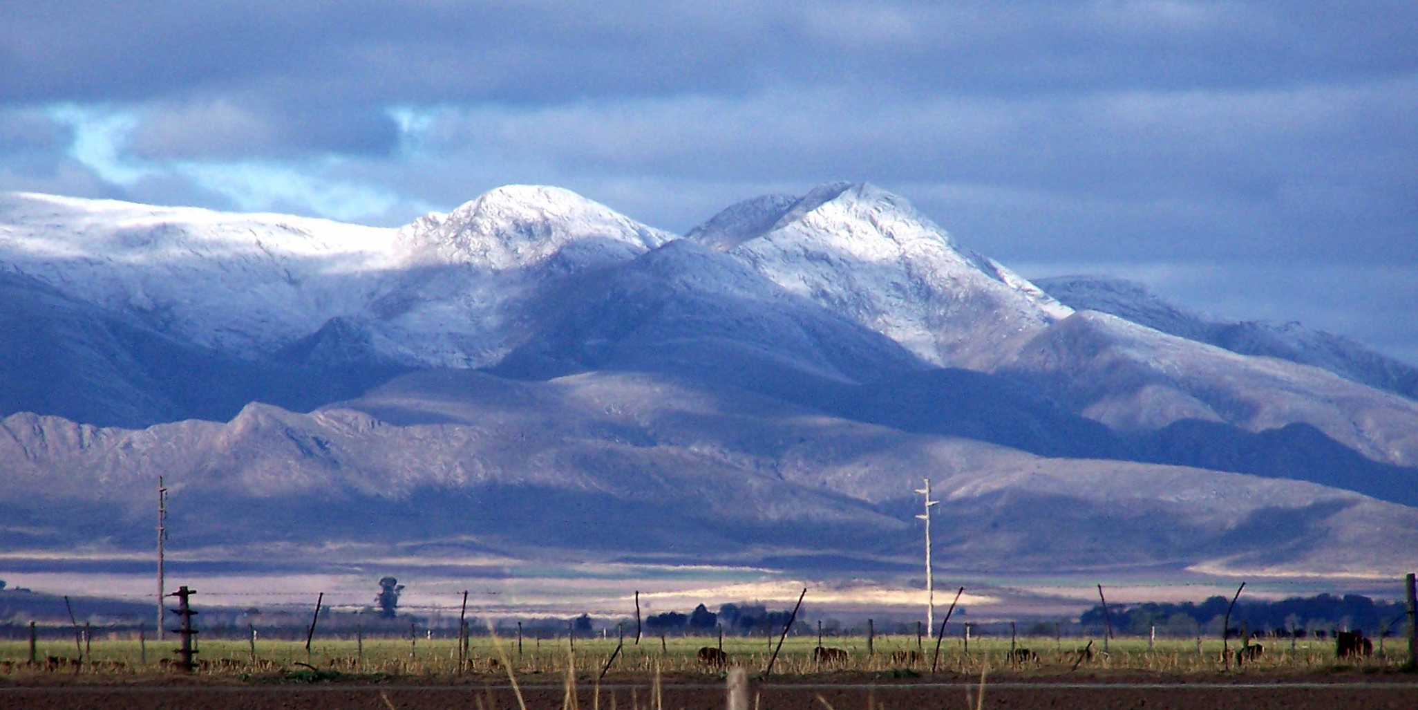 Nevadas del 2007 en el cordón serrano Sierra de la Ventana, provincia de Buenos Aires, Argentina.